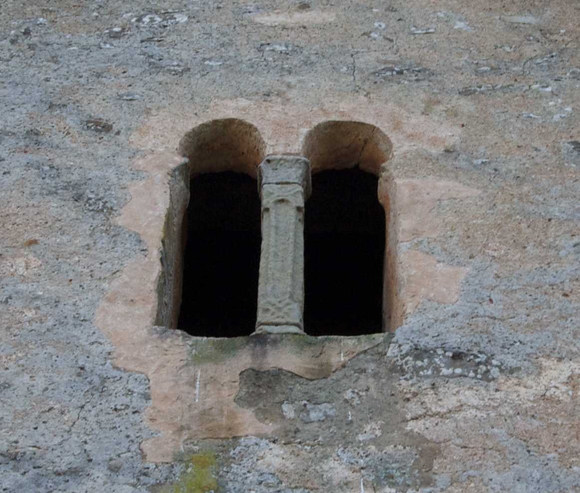 Iglesia de San Salvador (Priesca)